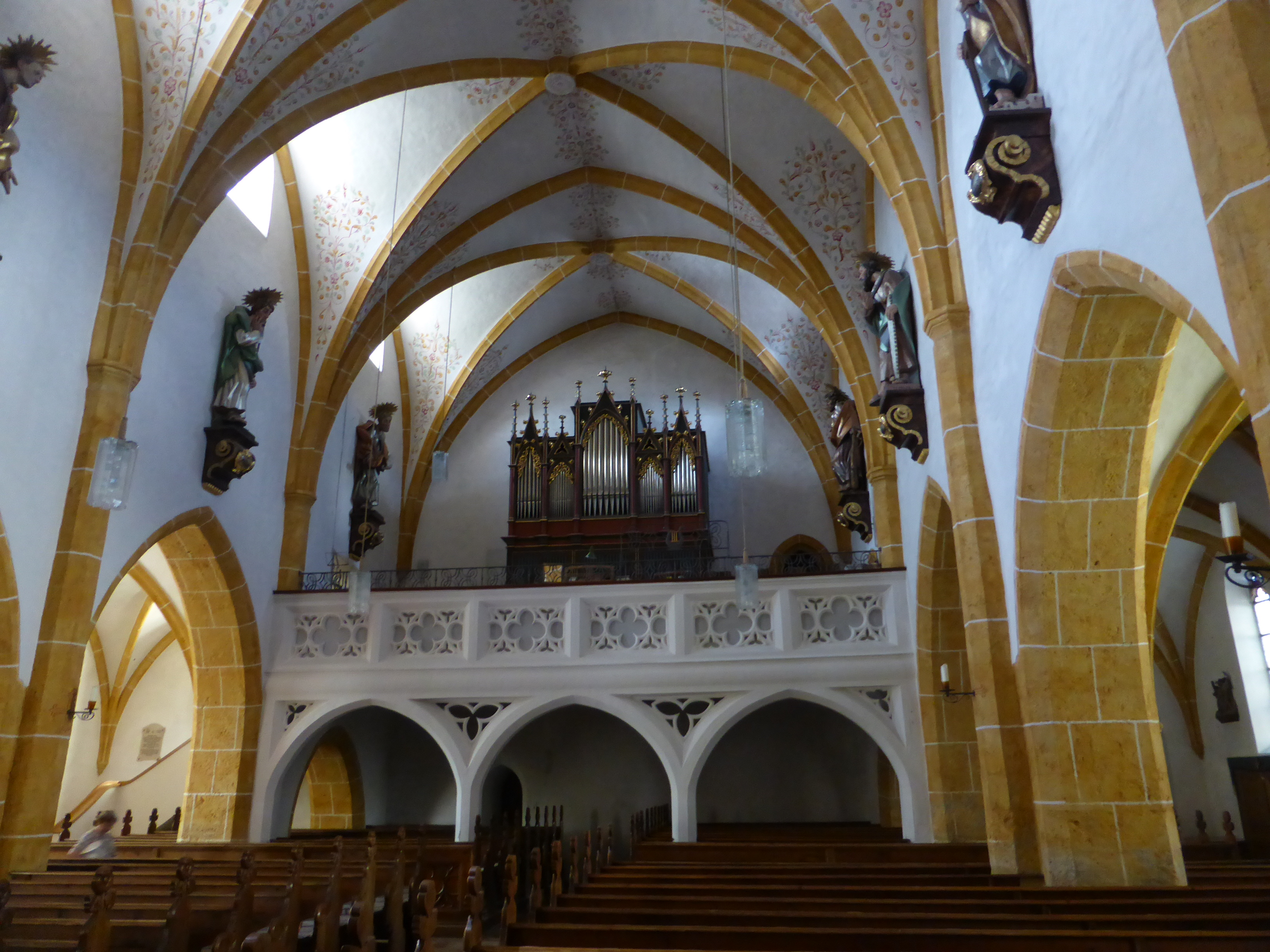 Kath. Pfarrkirche Dekanatskirche Unsere liebe Frau Geburt